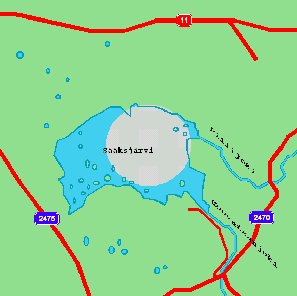 Sääkjärven kraatteri * Sääksjärvi nedslagskrater * Lake Sääksjärvi impact crater